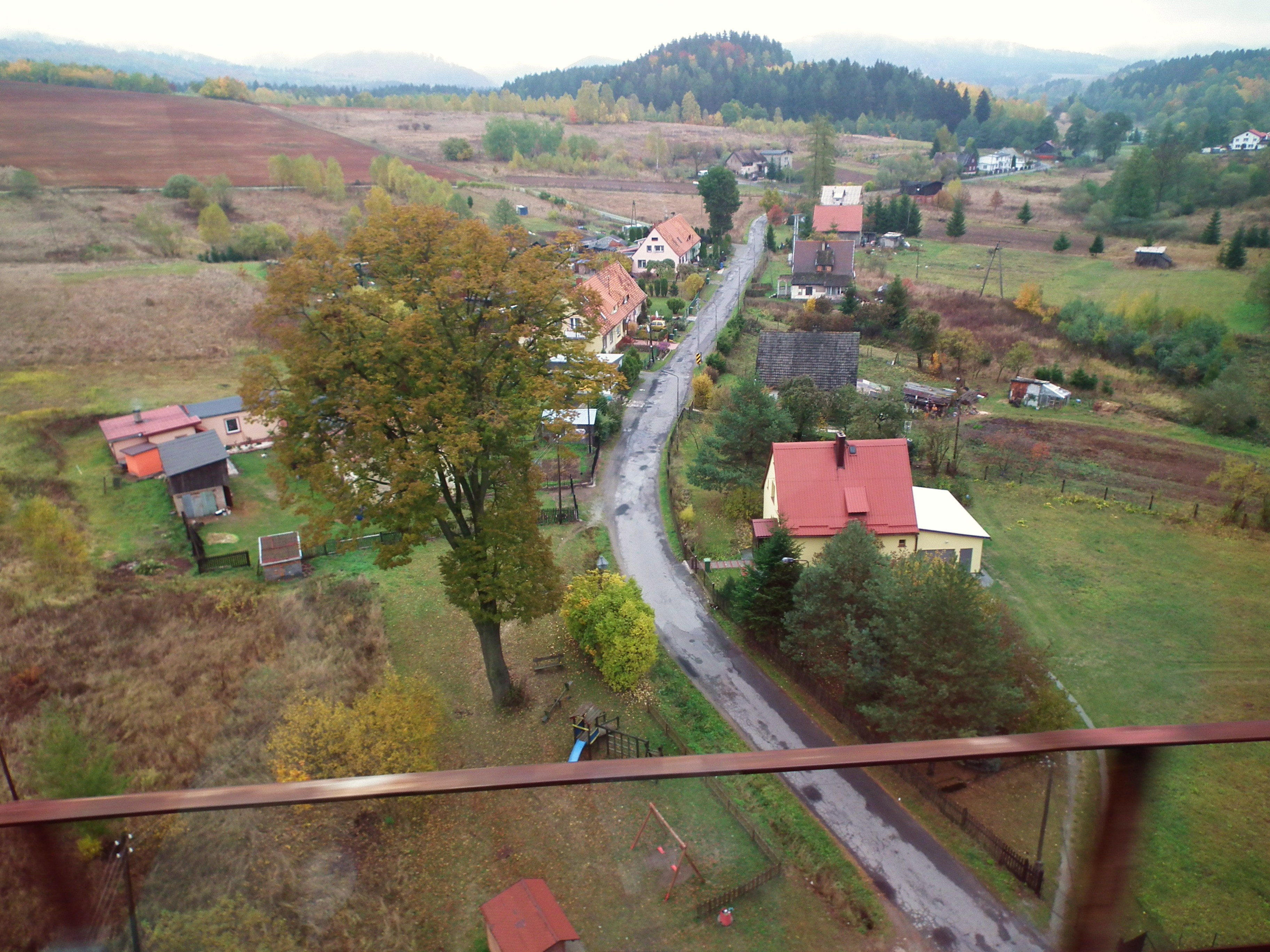 Ludwikowice Kłodzkie widziane z linii kolejowej Wałbrzych - Kłodzko.